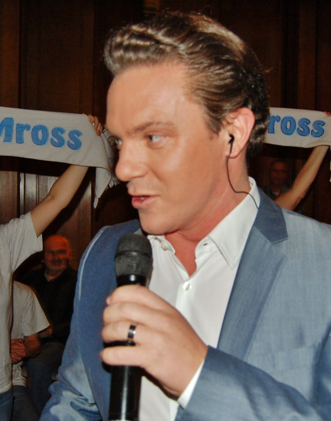 Stefan Mross, deutscher Sänger, Trompeter und TV-Moderator (2013)